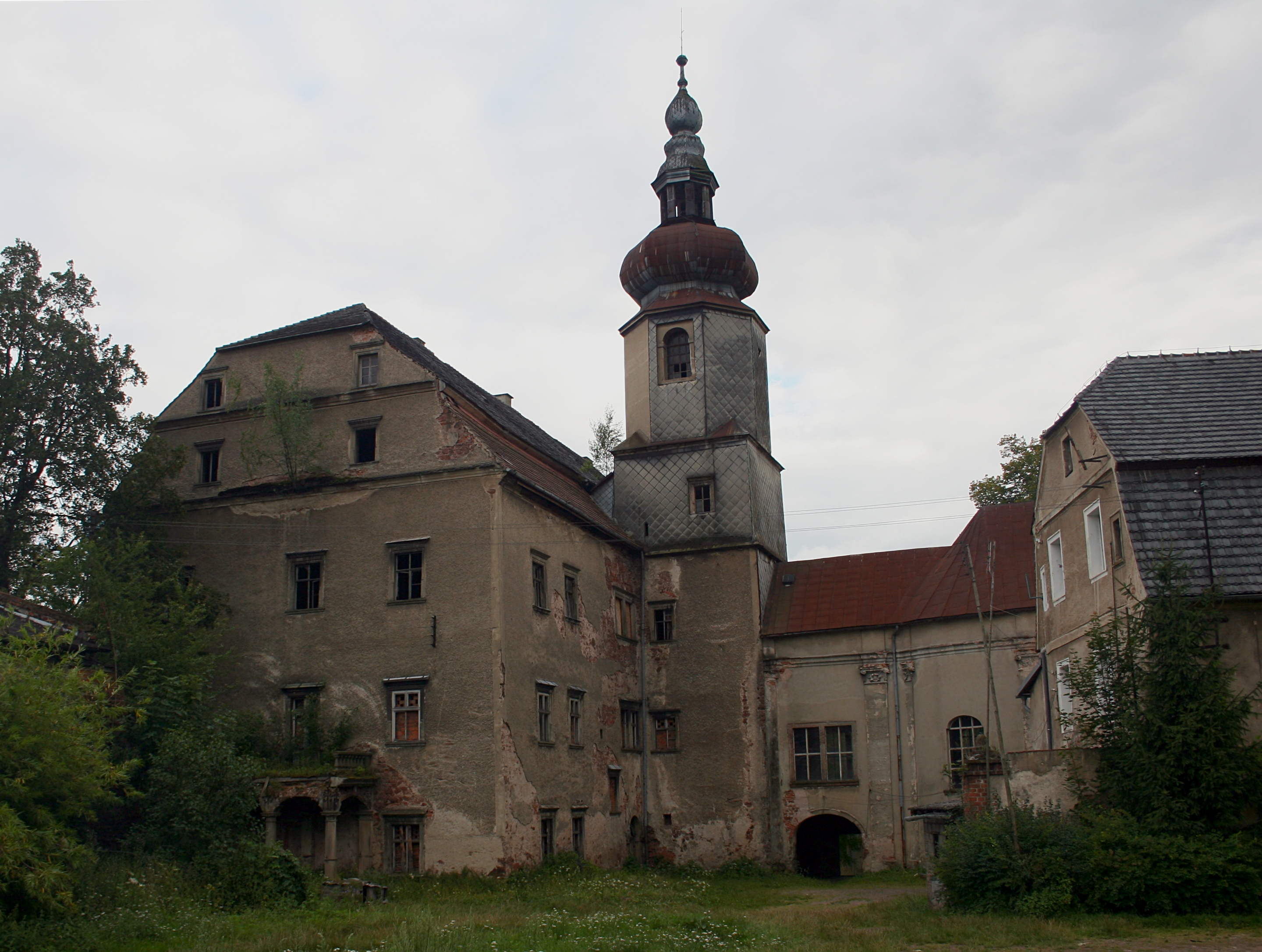 Fragment zespołu pałacowego "Sarny" w Ścinawce Górnej, powiat kłodzki